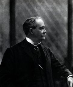 Don Epifanio de Fortuny, de Carpi, de Senromá, de Berart, de Guardia, de Blondel, de Carles, Epifanio, II Barón de Esponellá, Abogado. Gran Cruz de Carlos III.